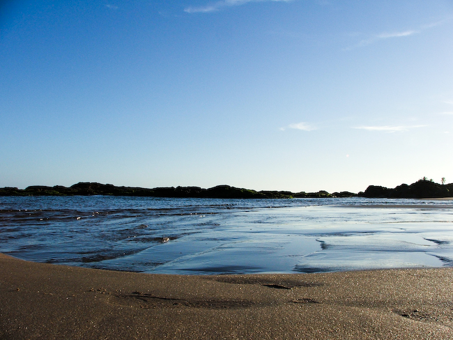 A praia da Pituba, Salvador, Bahia, Brasil.